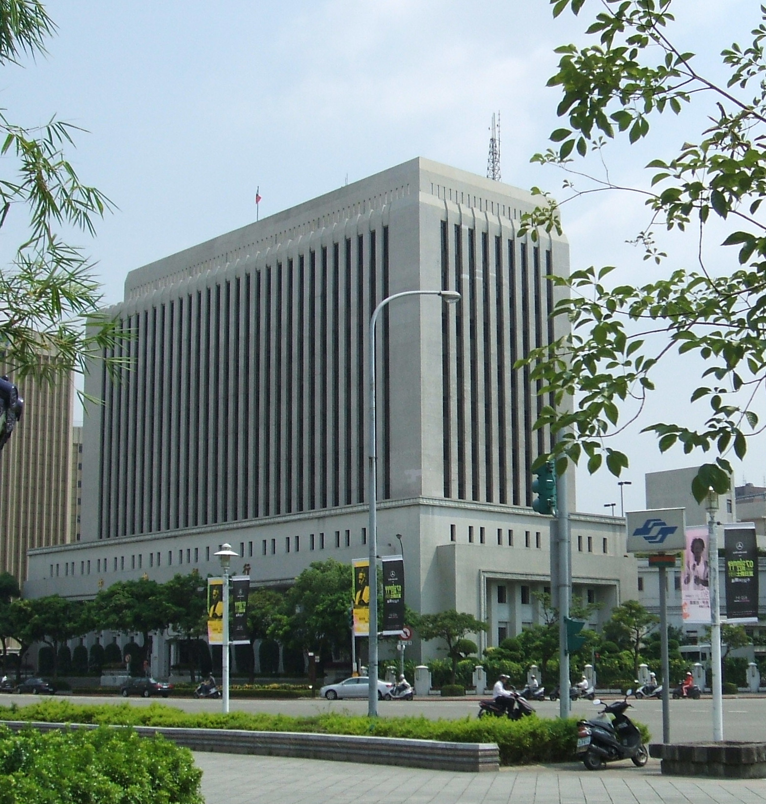 中華民國中央銀行第一總行大樓。